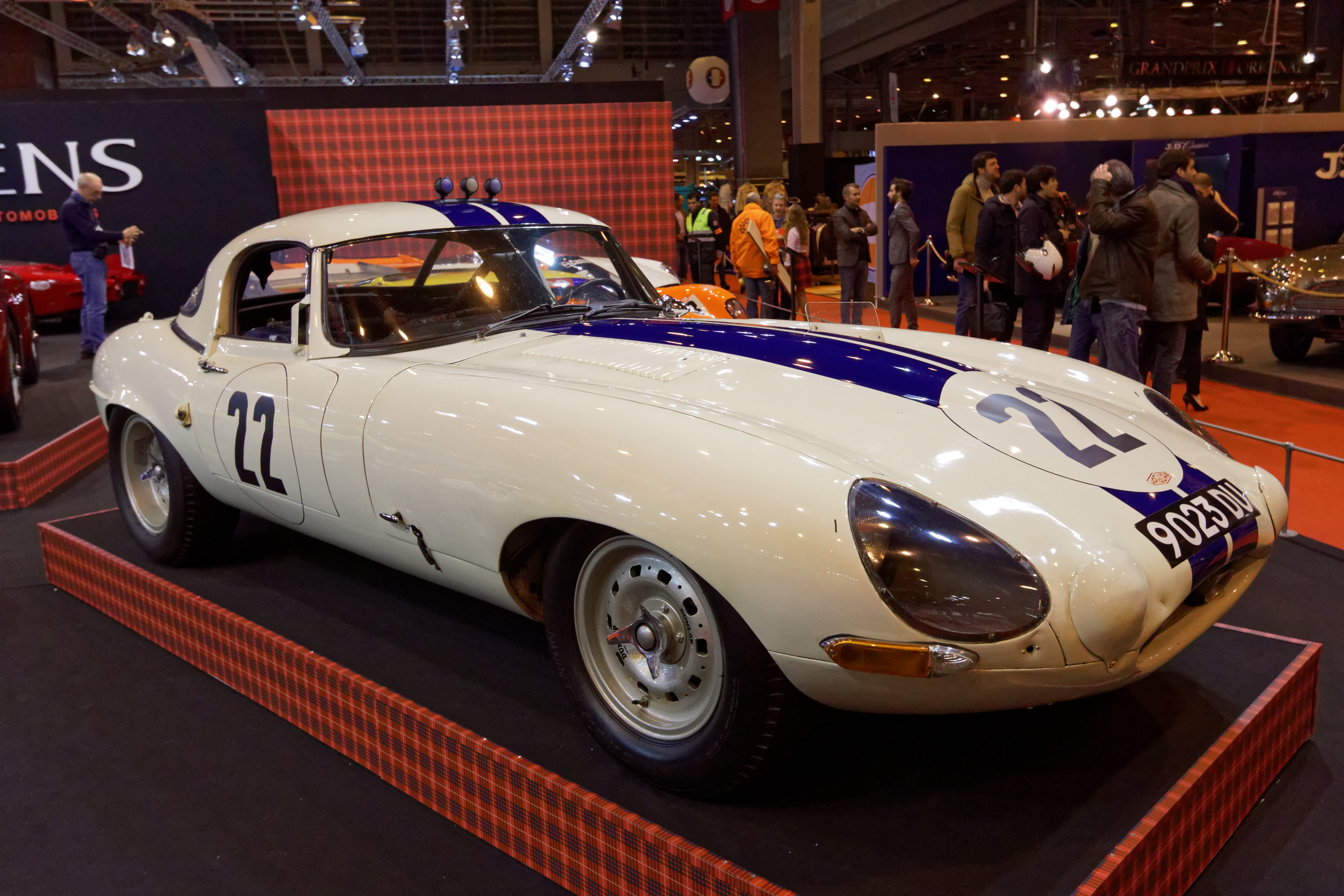 Une Jaguar Lightweigt E-Type prototype de 1961 exposée lors du salon Rétromobile 2016.